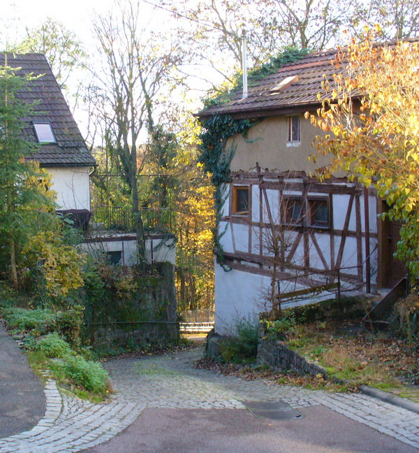 Waiblingen-Neustadt